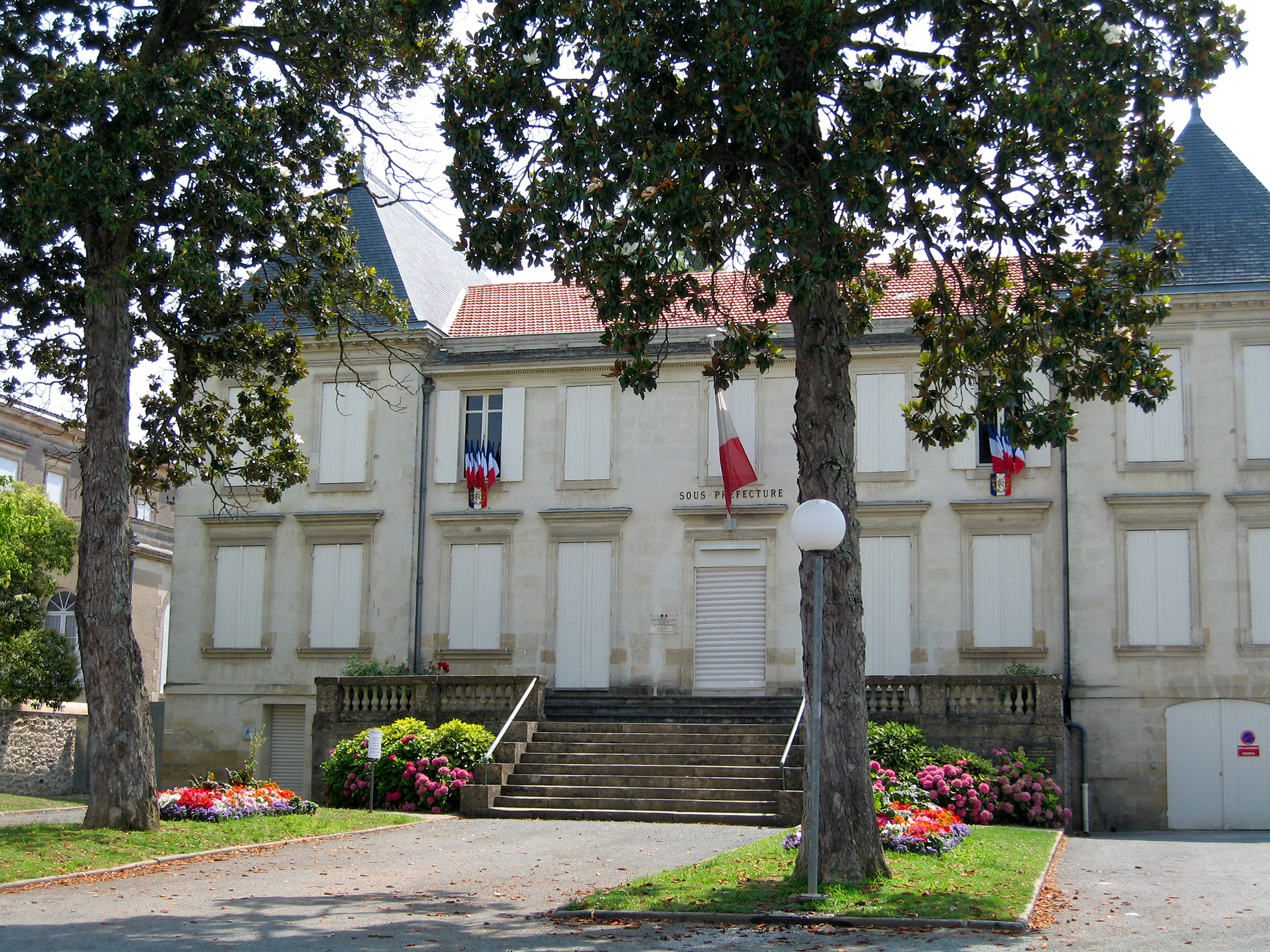 Langon, France.